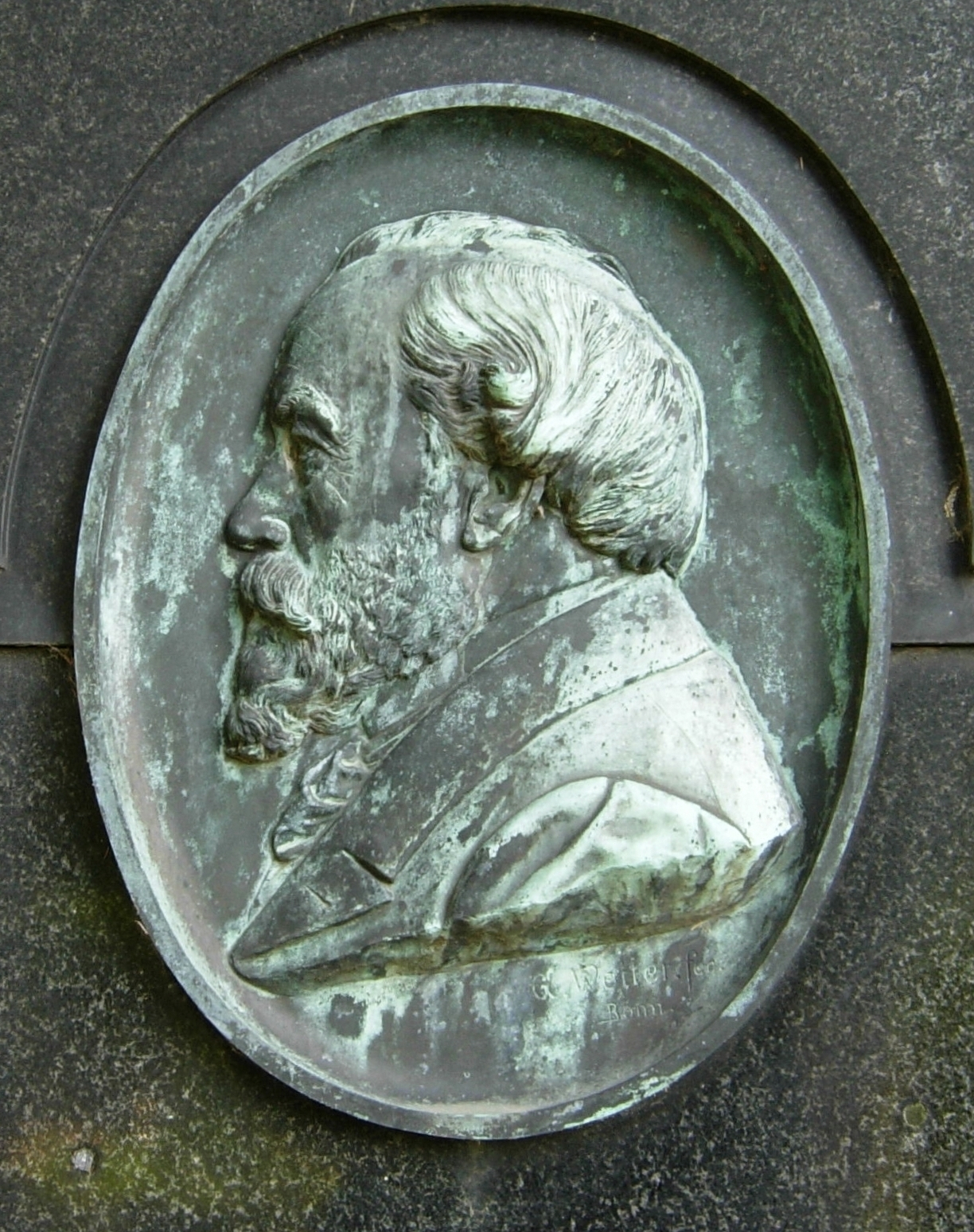 Gottfried Welter (1871–1940): Bronze-Medaillon für den Physiologen Eduard Pflüger auf dem Poppelsdorfer Friedhof in Bonn